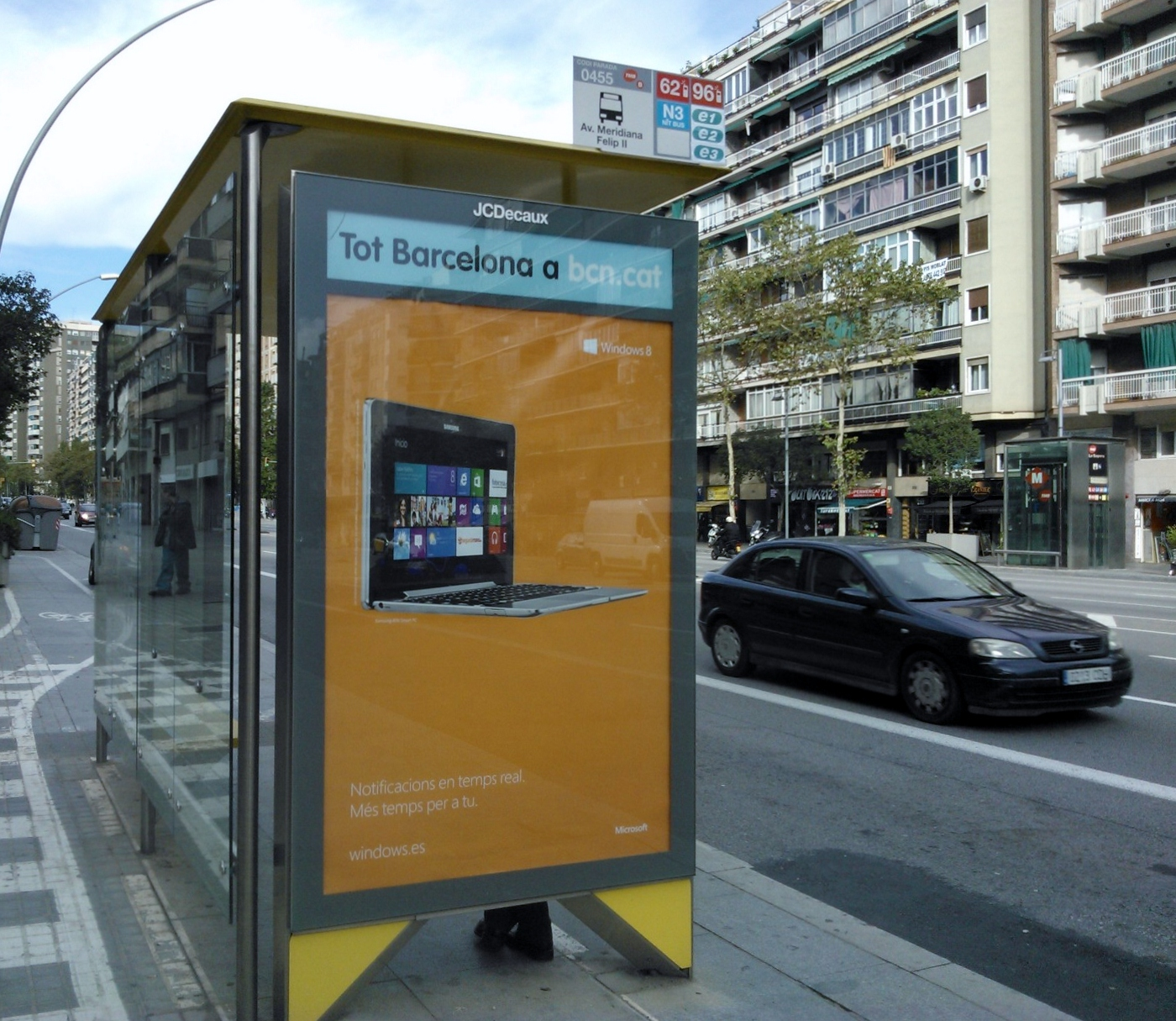 Autobús interurbà/urba a Barcelona